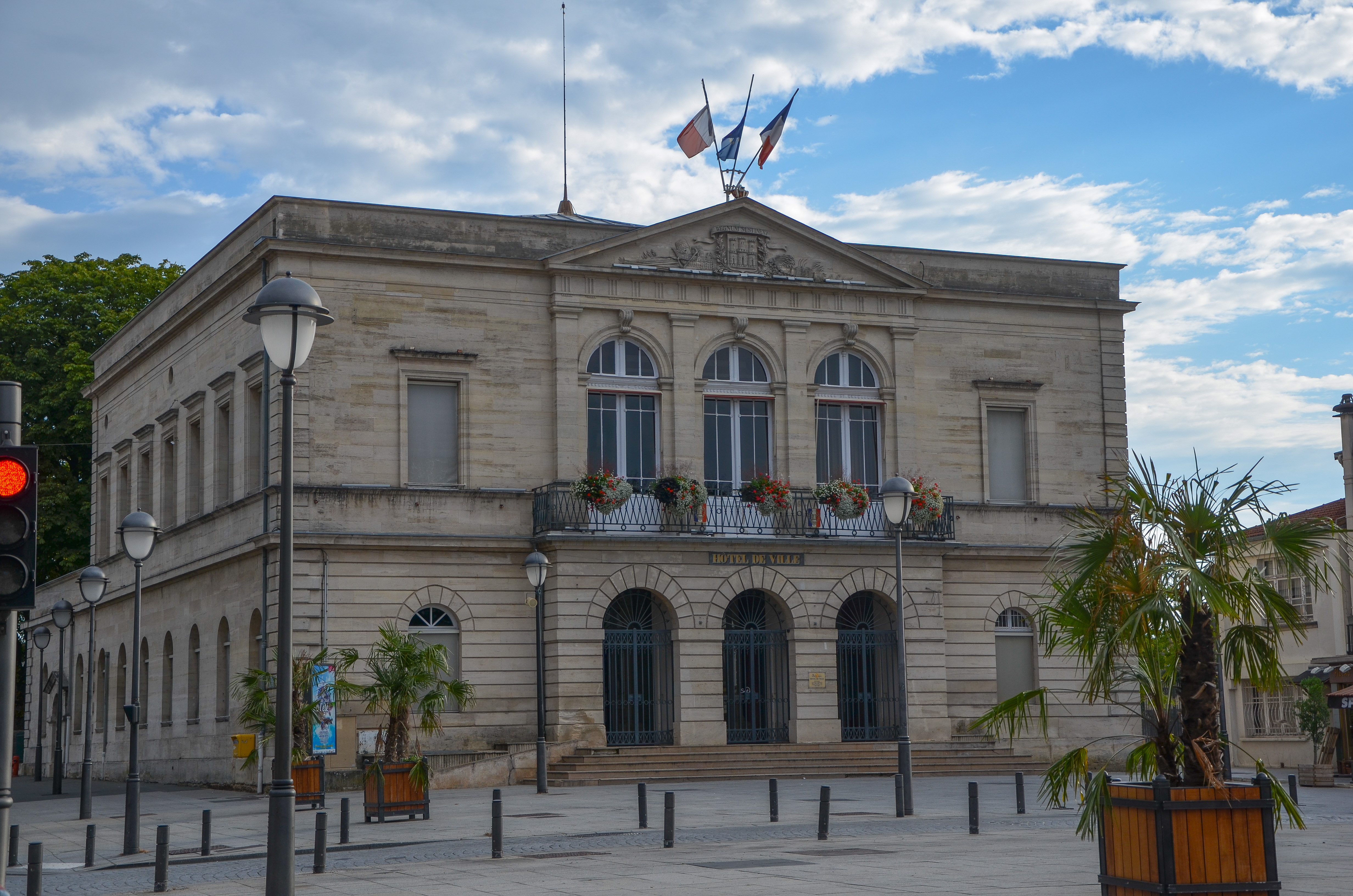 Hotel de ville de St Dizier, Haute-Marne, France